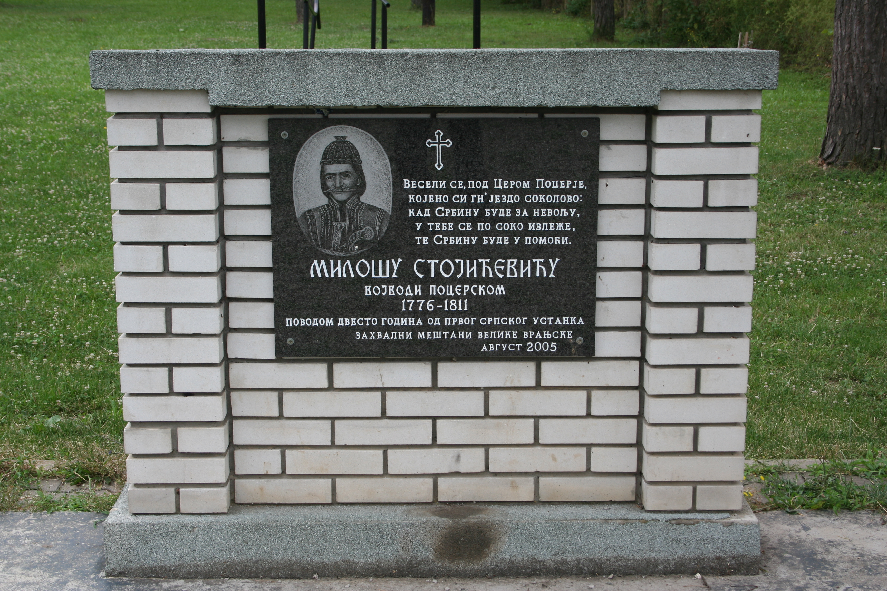 Spomenik u dvorištu škole, Gornja Vranjska